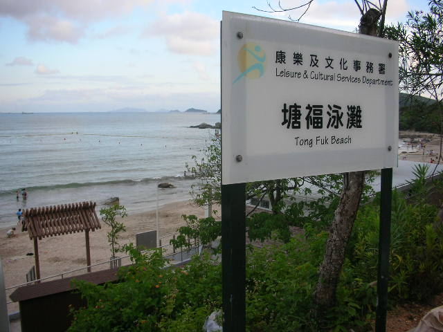 中文（香港）: 塘福泳灘入口。